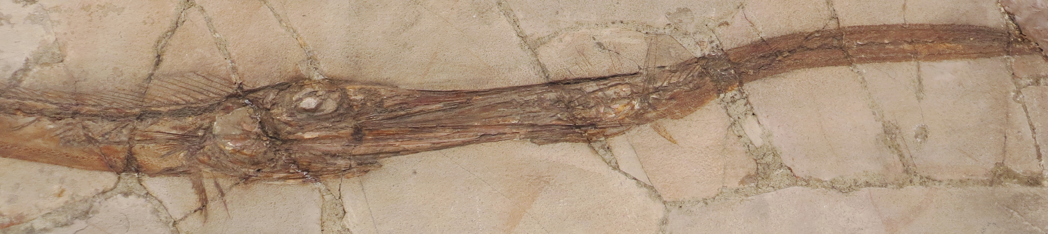 Blochius longirostris with prey